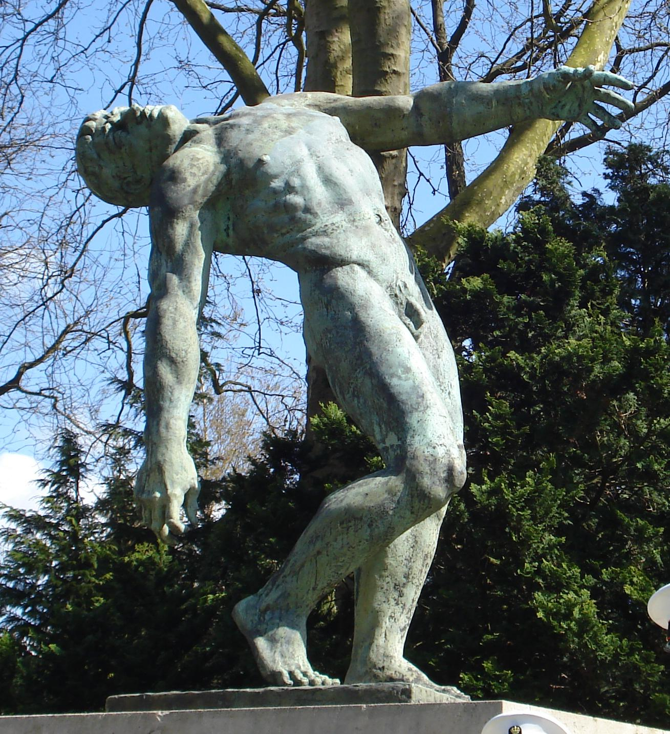 Rotterdam Crooswijk, begraafplaats. Monument voor Nederlandse militairen, "Vallende man" van Cor van Kralingen. Rotterdam/The Netherlands.